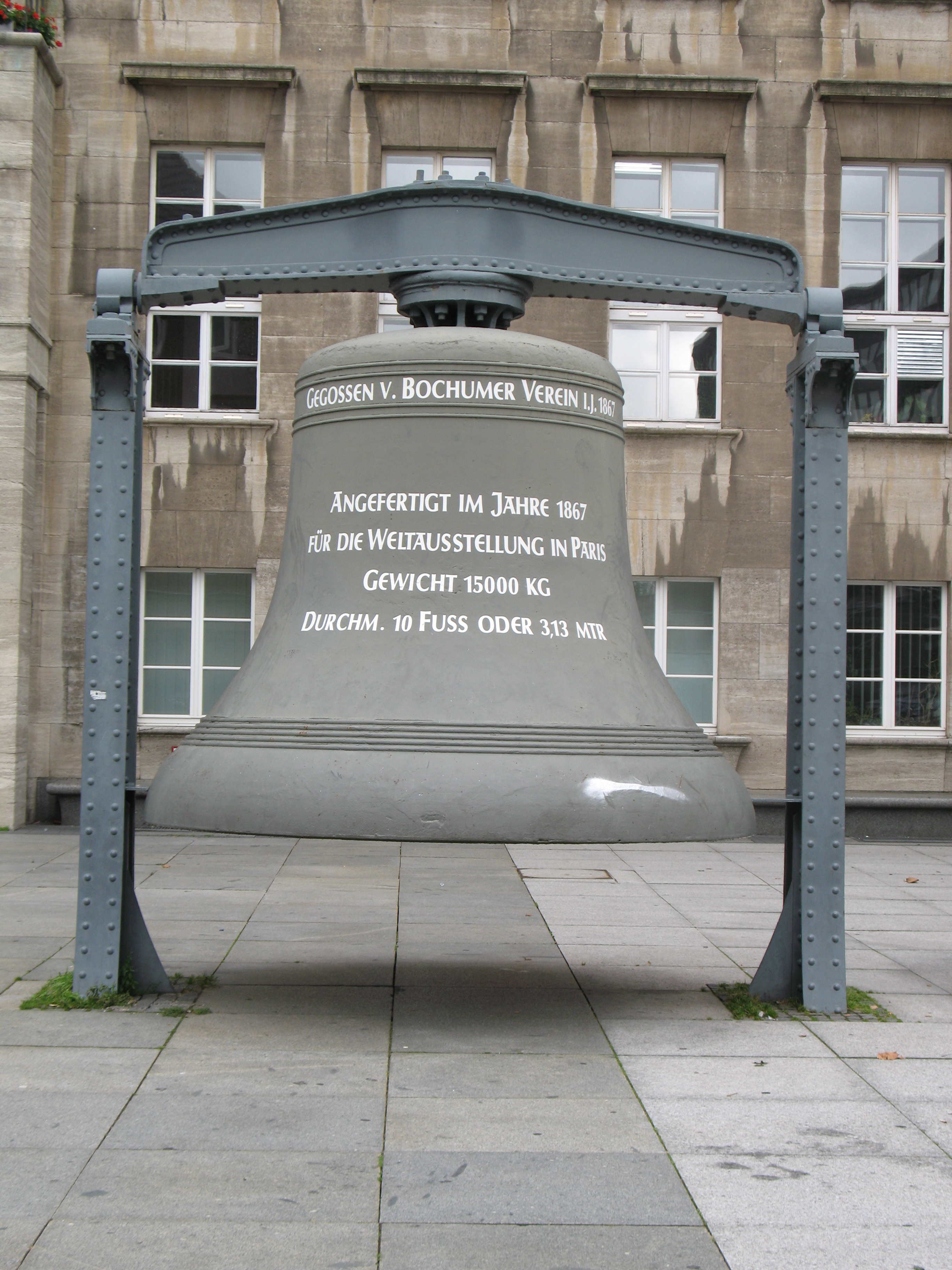 Glocke Bochumer Verein Rathaus Bochum aus dem Jahr 1867 anläßlich der Pariser Weltausstellung